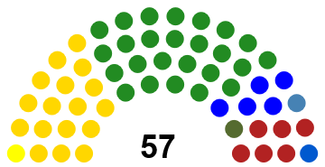 composicion periodo 2006-2010